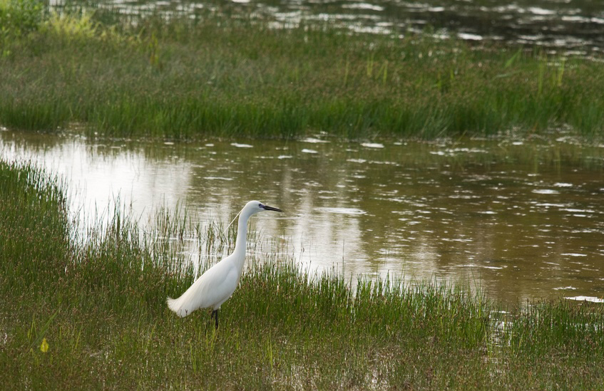 aigrette garzette (Egretta garzetta), Baie de Somme